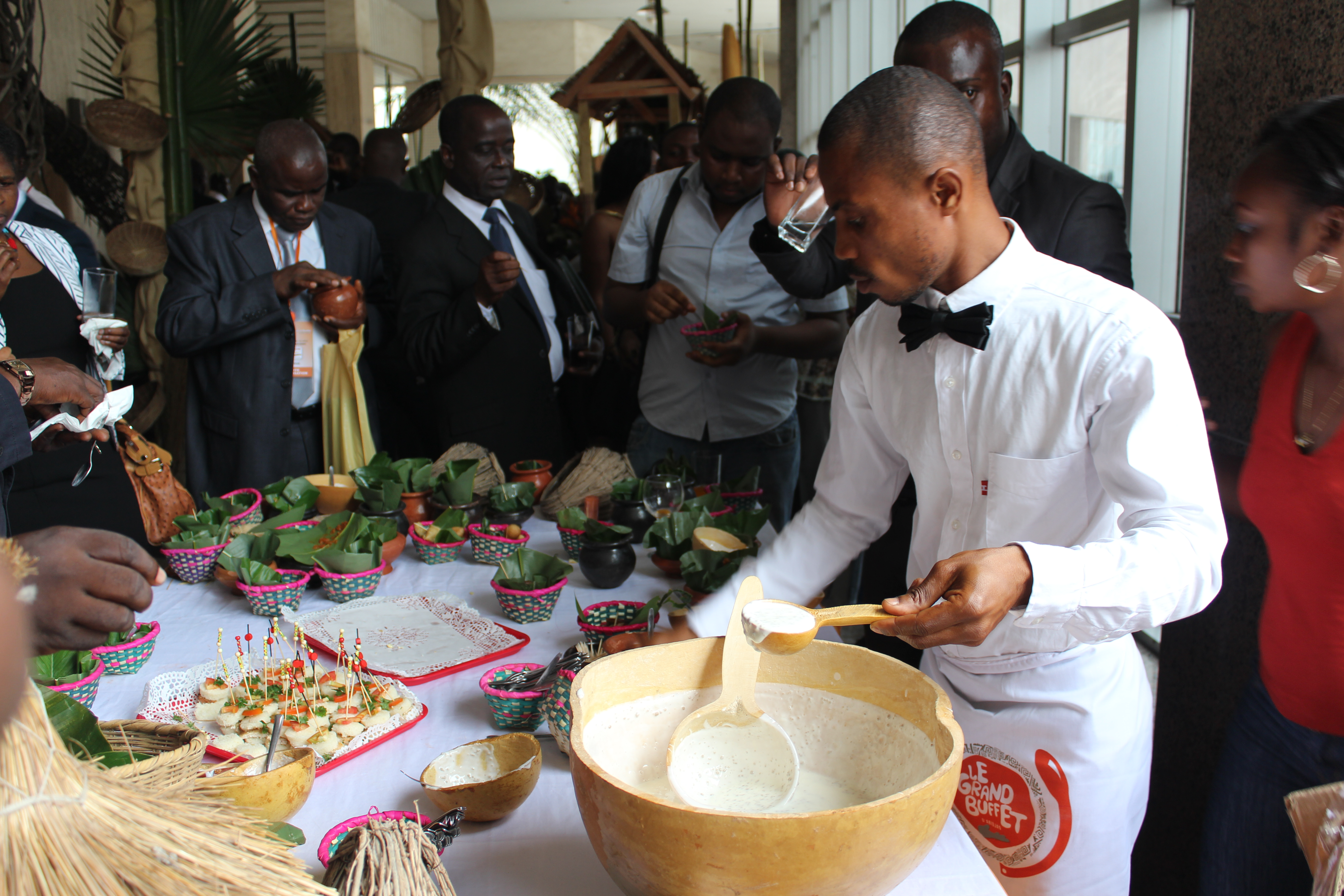 lait caillé avec granulé de mil ajouté